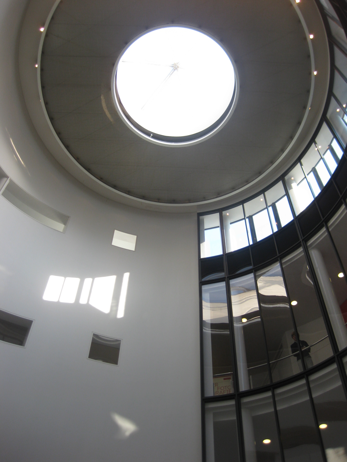 Das alte Kaufhaus Althoff wurde zum Stadtmuseum Münster umgebaut und wird mit einer Architekturpromenade um eine Rotunde (Idee: Architekt Christoph von Hausen) erschlossen.